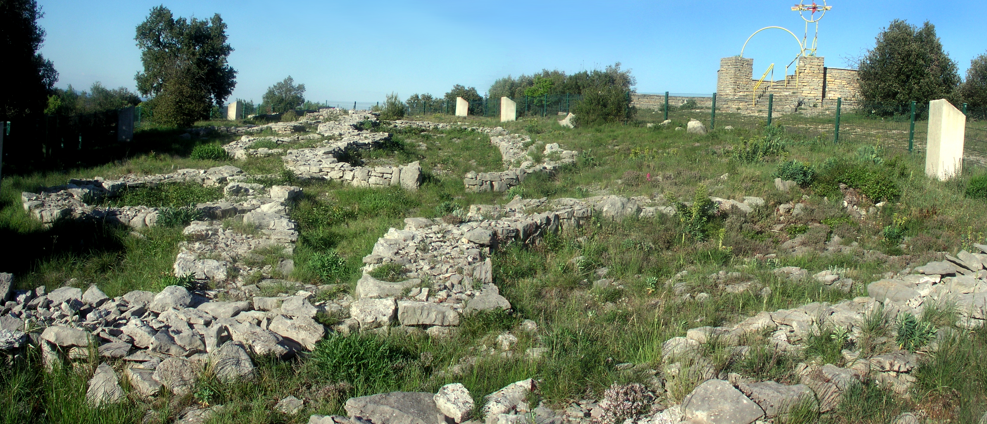 Mur d'enceinte préhistorique du Rocher du Causse, Claret, Hérault, France.